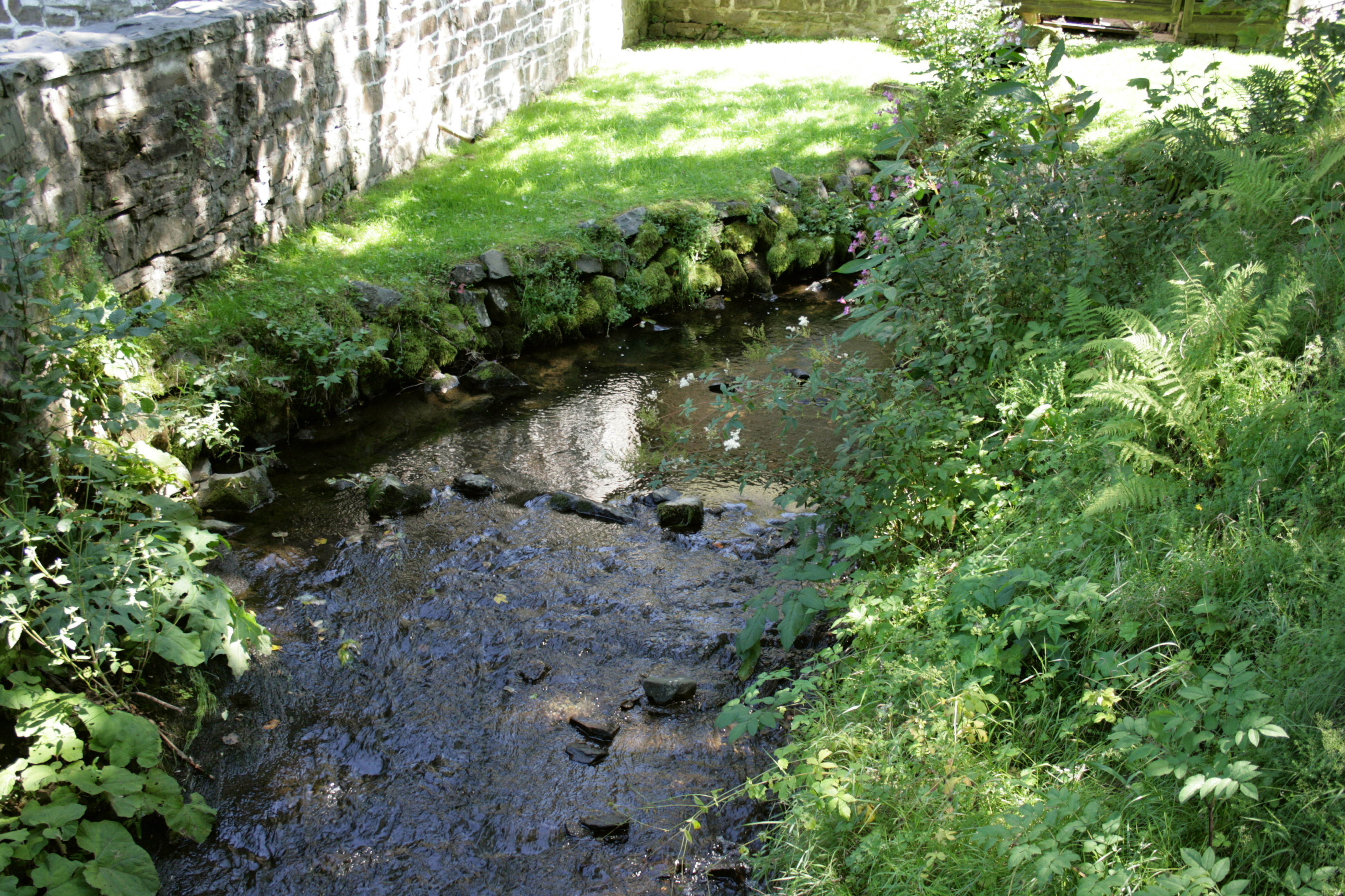 Schwarze Ahe nahe der Herscheider Mühle in Herscheid